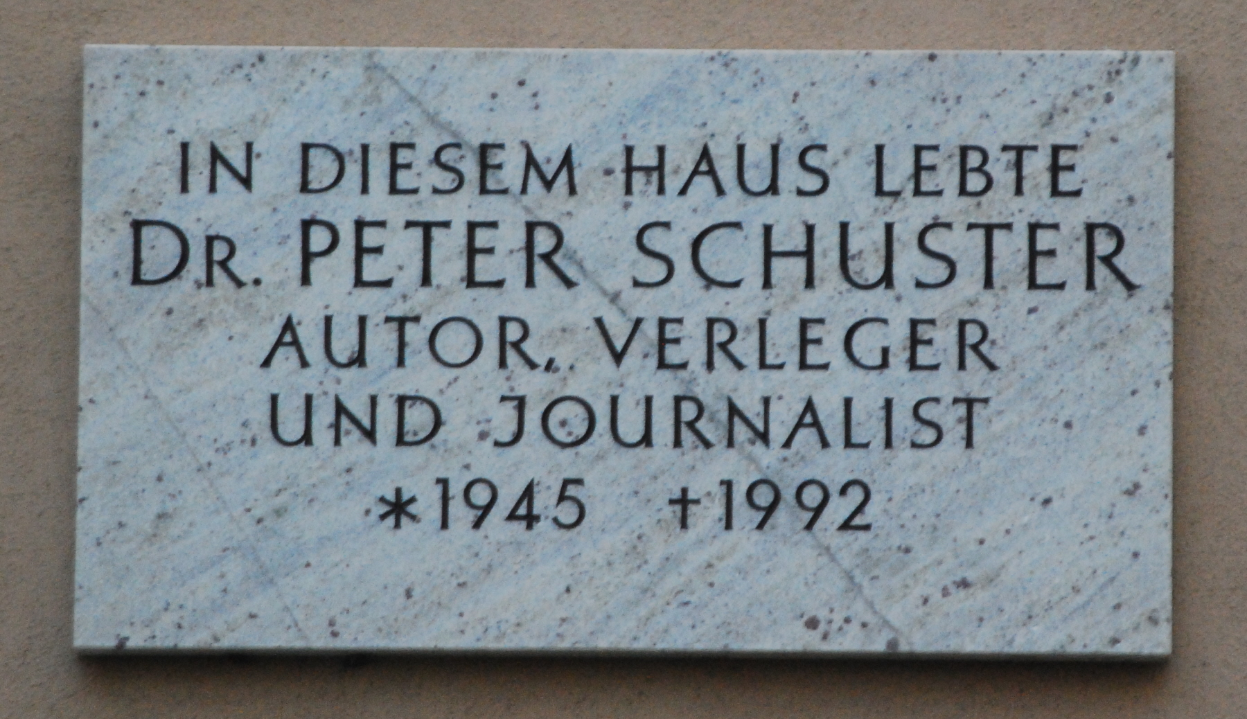 Gedenktafel für Peter Schuster am Domplatz 20 in Wiener Neustadt in Niederösterreich